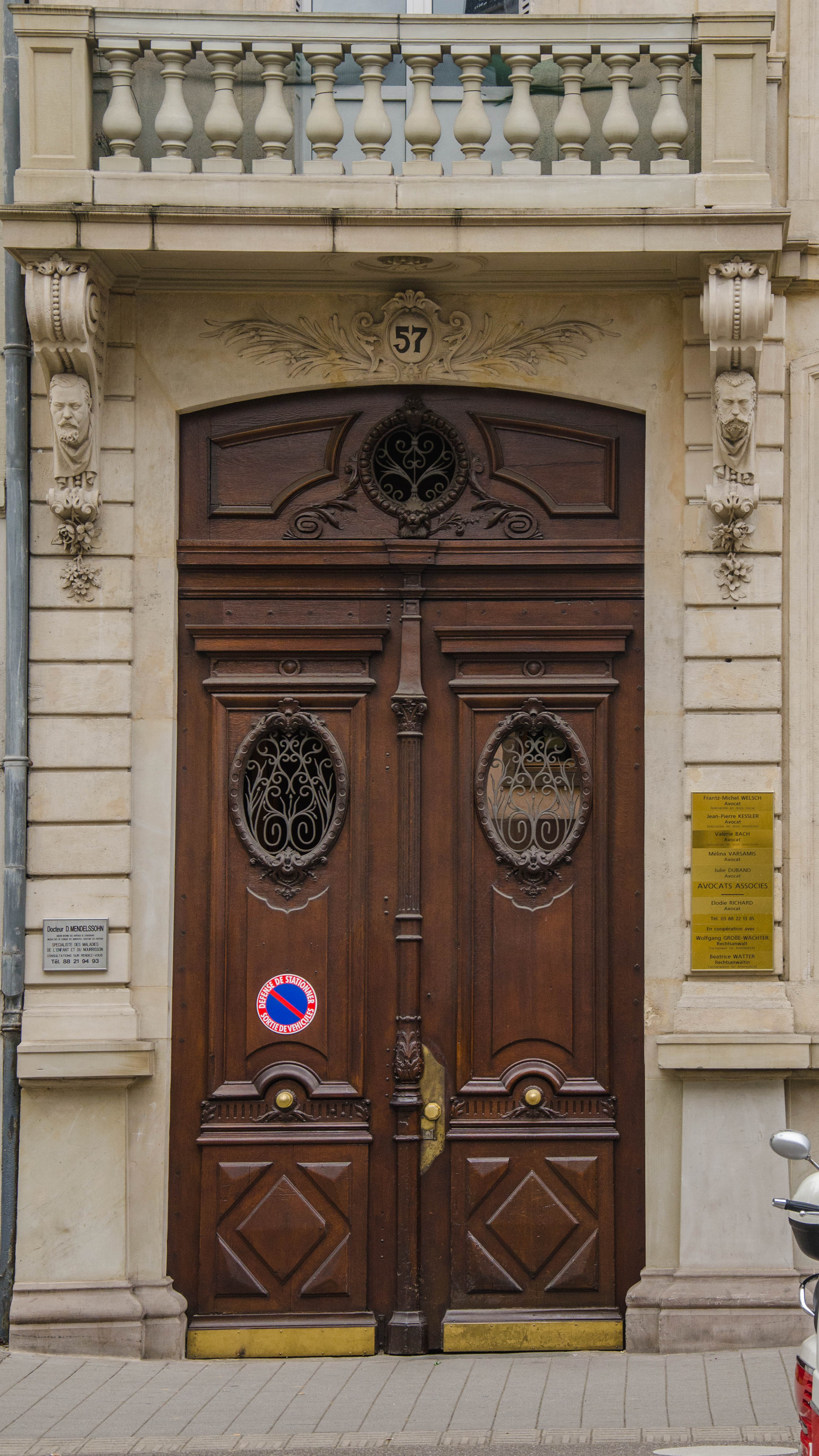 Cet immeuble comportent de nombreux visages beaucoup trop réalistes pour n'être que des œuvres de l'esprit.